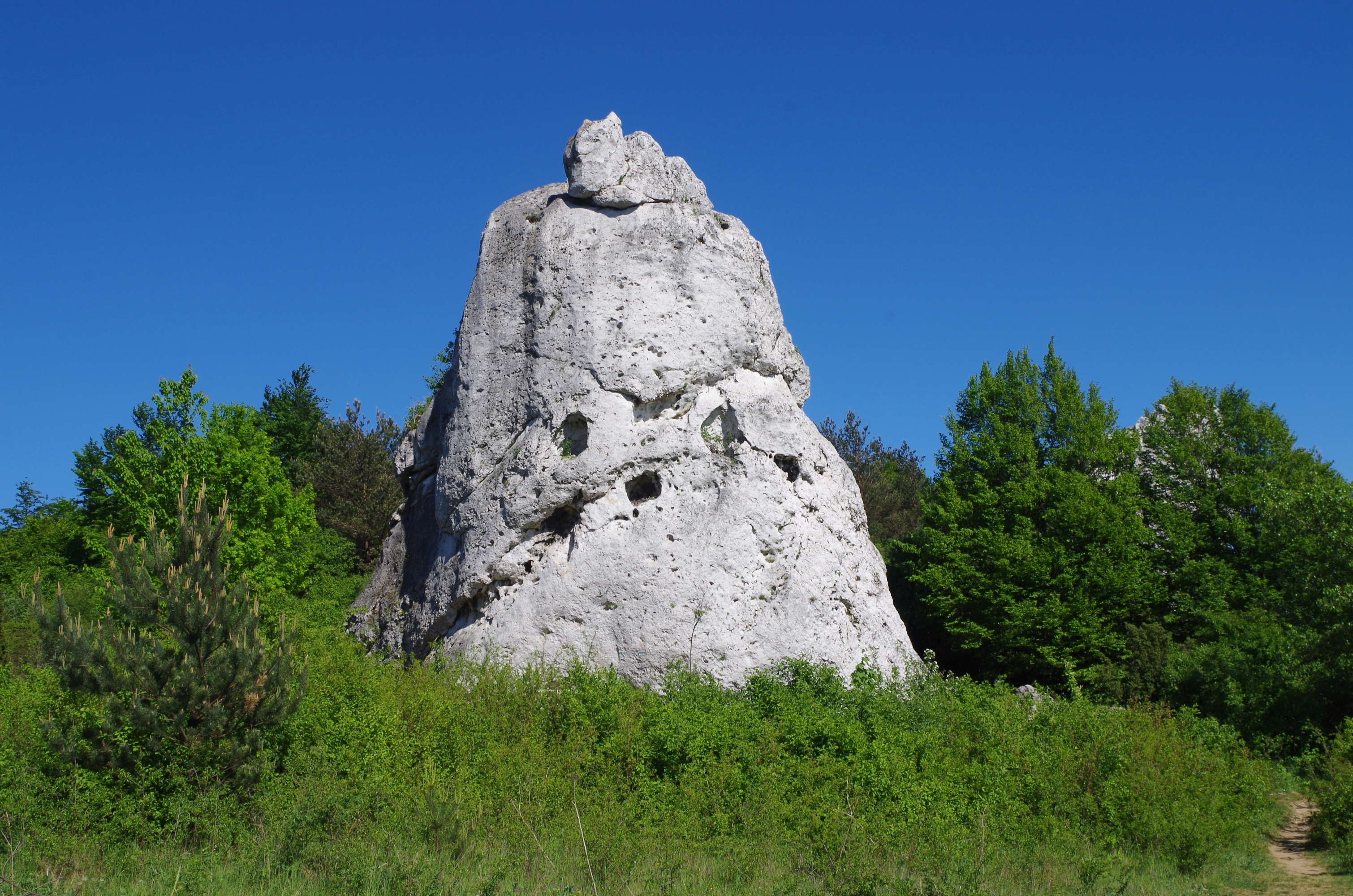 Skały Rzędkowickie. Zegarowa